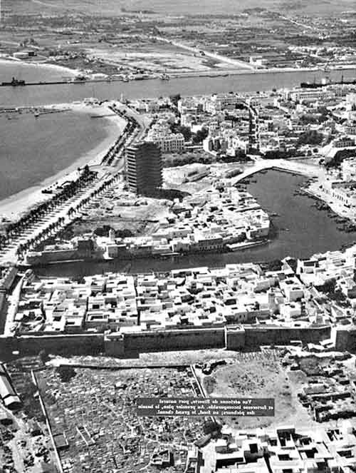 Vue aérienne de Bizerte en 1959, Tunisia